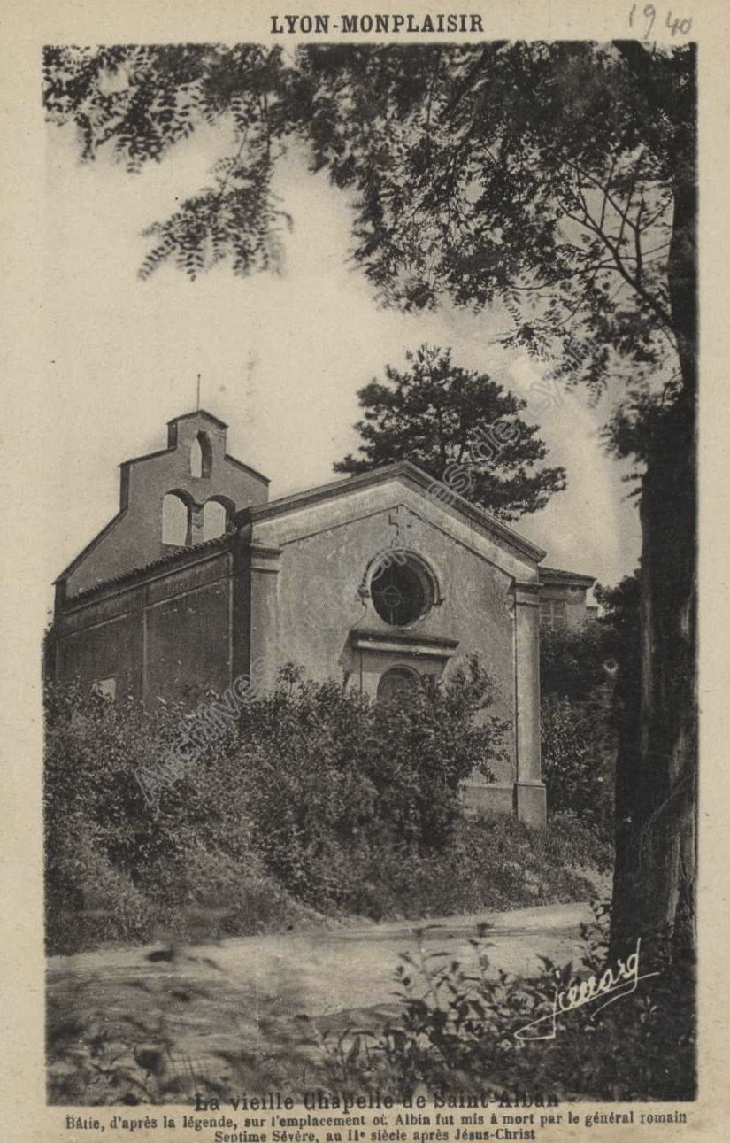 Carte postale ancienne de l'église Notre-Dame-Saint-Alban.